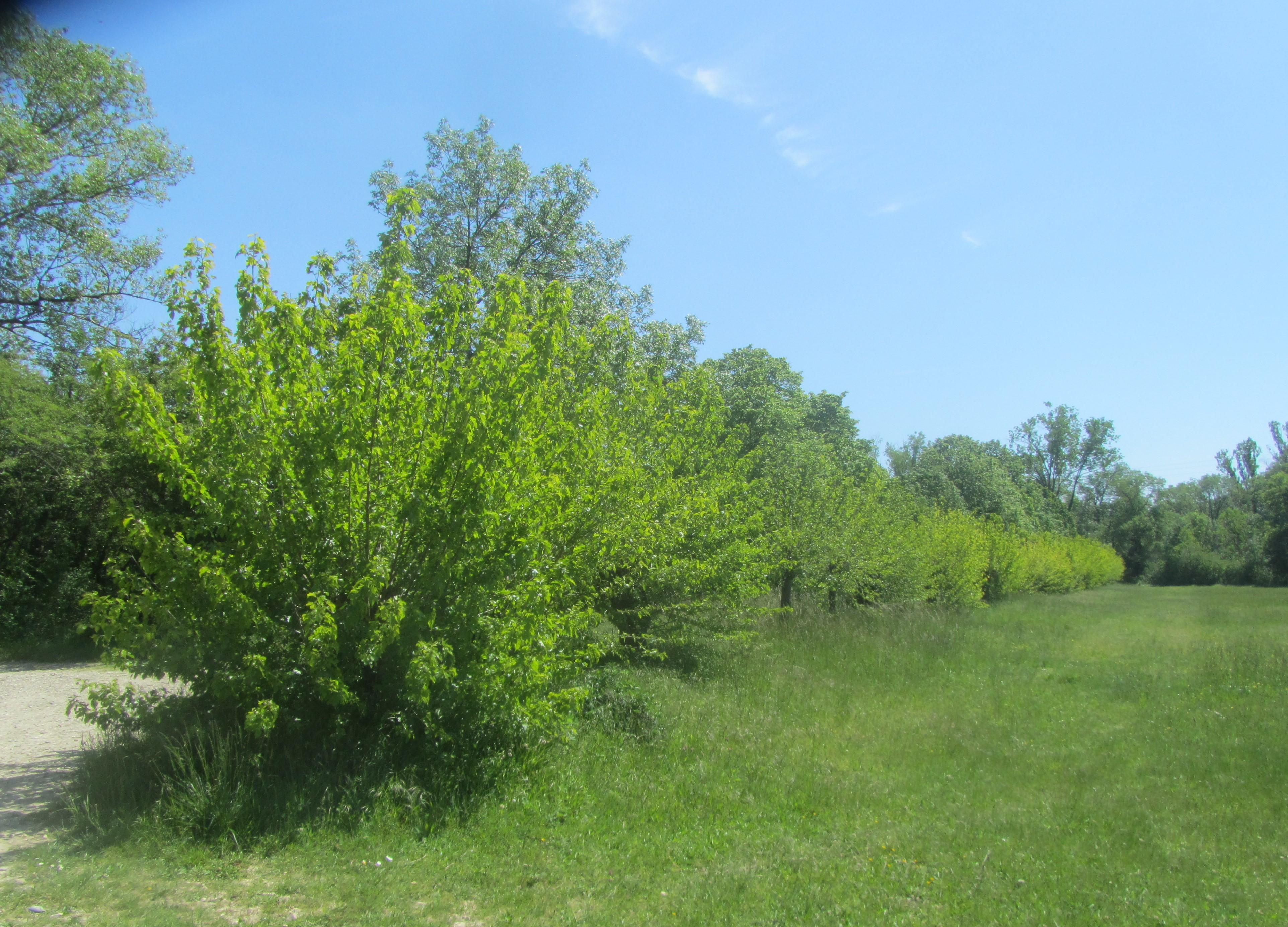 ancienne plantation de mûriers sur la commune de Miribel (01)